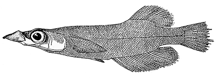 Entenschnabelkärpfling (Adrianichthys kruyti) Darstellung aus: 'Max Weber; L. F. de Beaufort: The fishes of the Indo-Australian Archipelago 4. Leiden, E. J. Brill ltd. 1922'